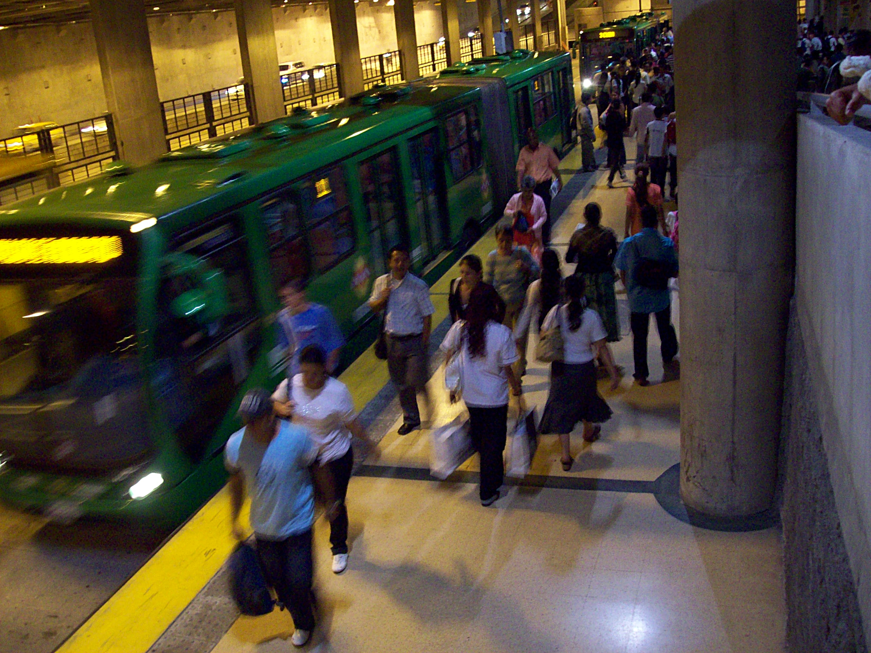 Interior del Intercambiador del Barrio Cuba en Pereira